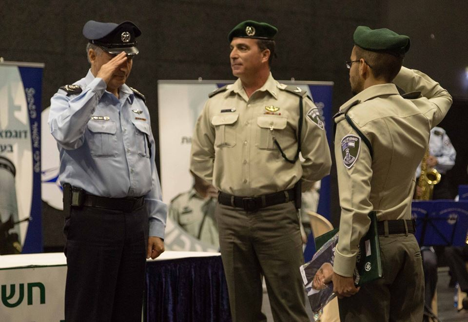 יוסי פוני ויוחנן דנינו